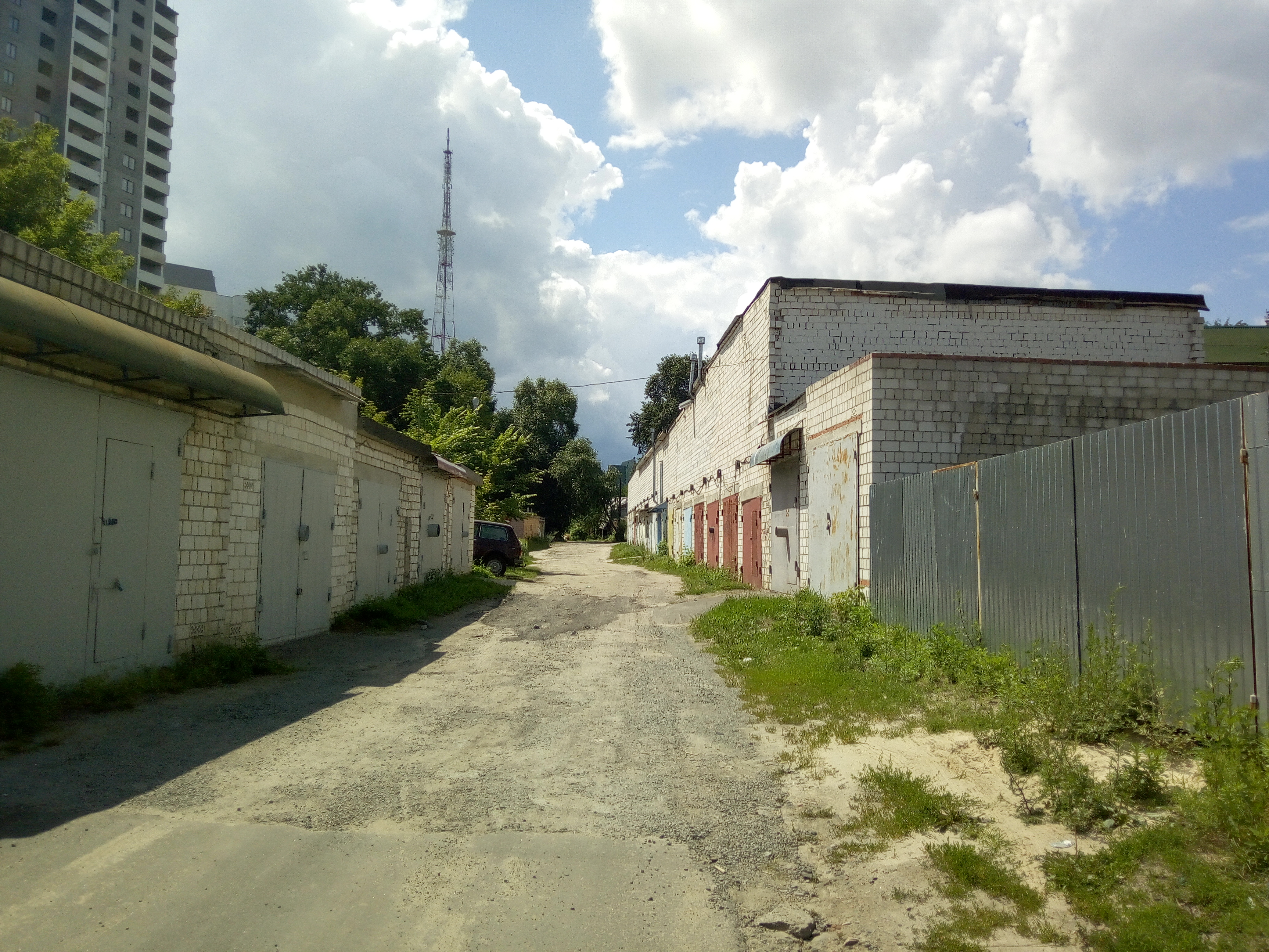 Цыганскі яр у Гомелі, 2018 г.